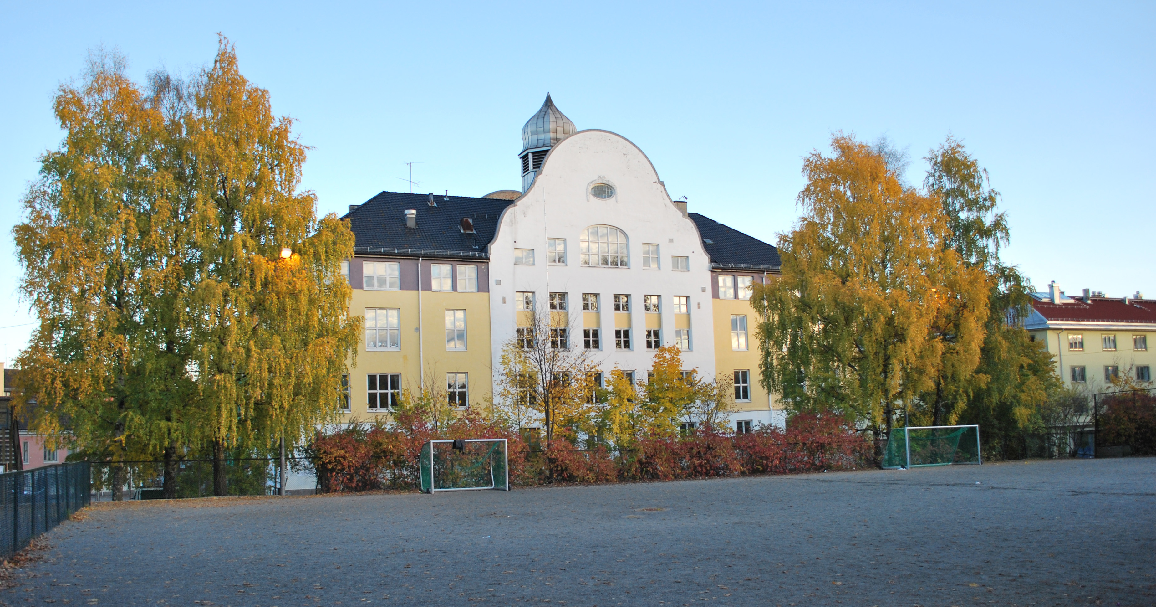 Bjølsen skole sett fra Bjølsenparken